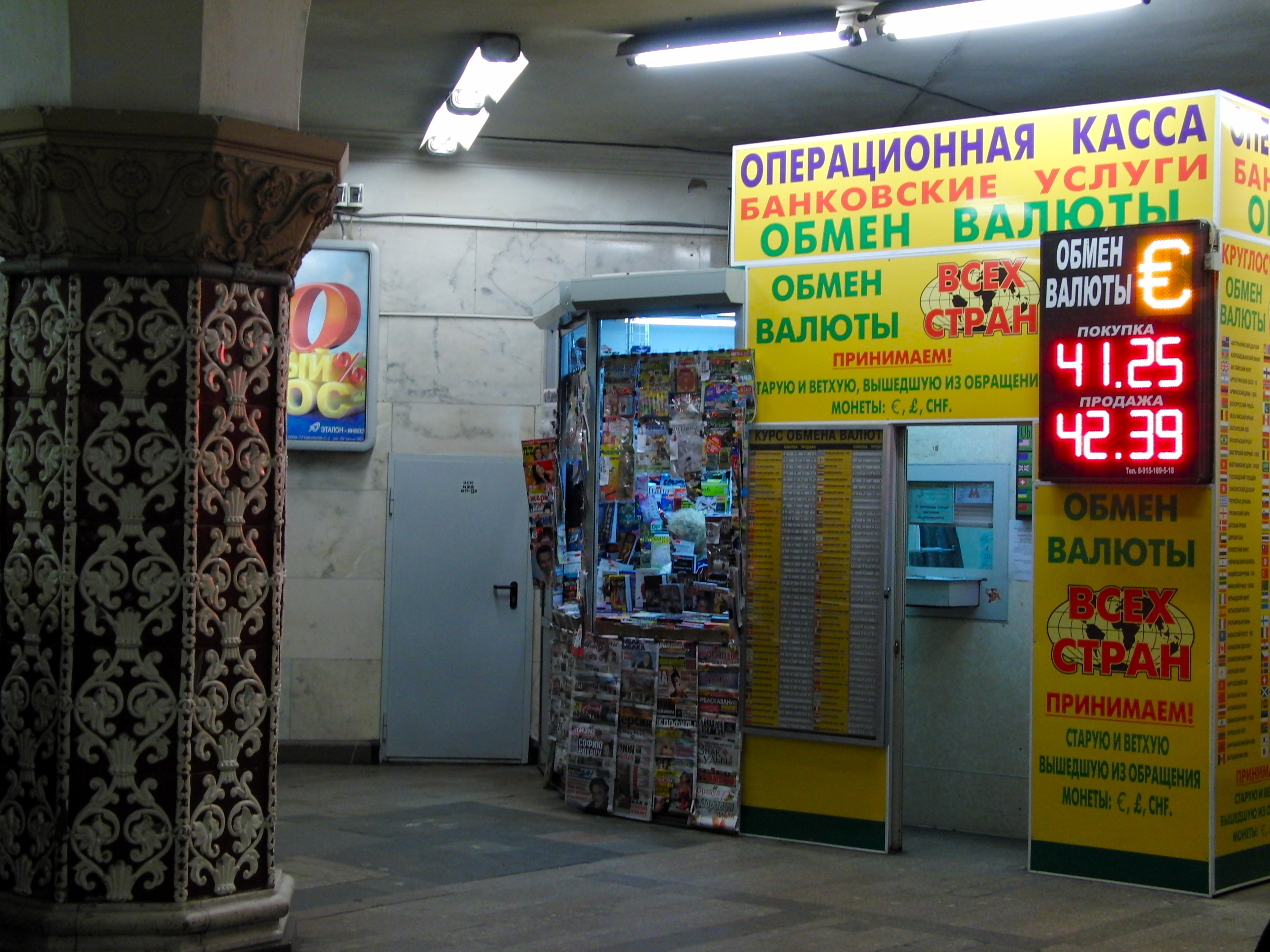 Komsomolskaya-radialnaya, currency exchange (Комсомольская-радиальная, обмен валюты)